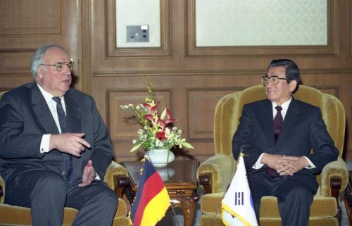 황인성 국무총리 헬무트 콜 독일 총리 접견